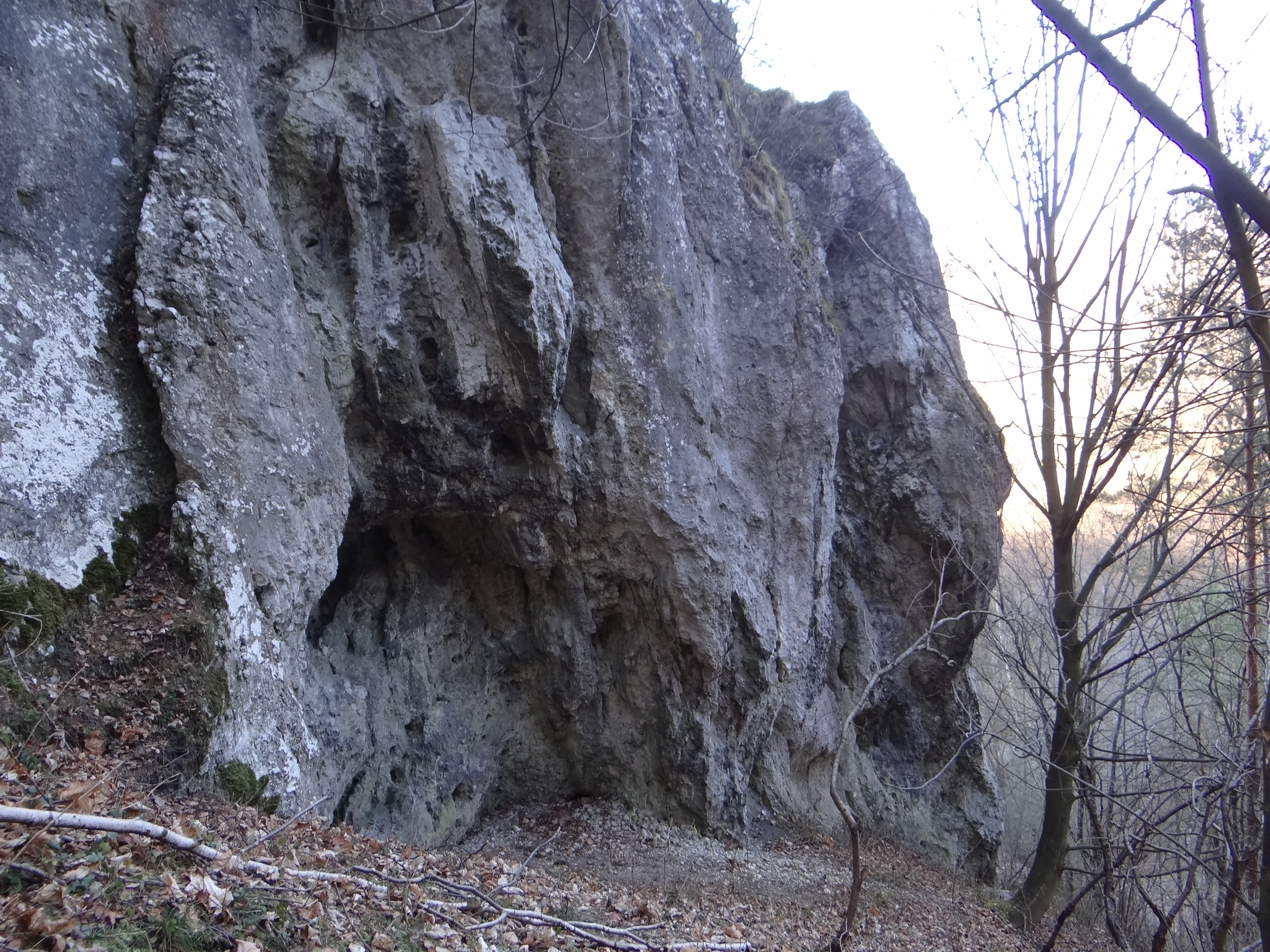 Mur pod Okrętem w Dolinie Kobylańskiej